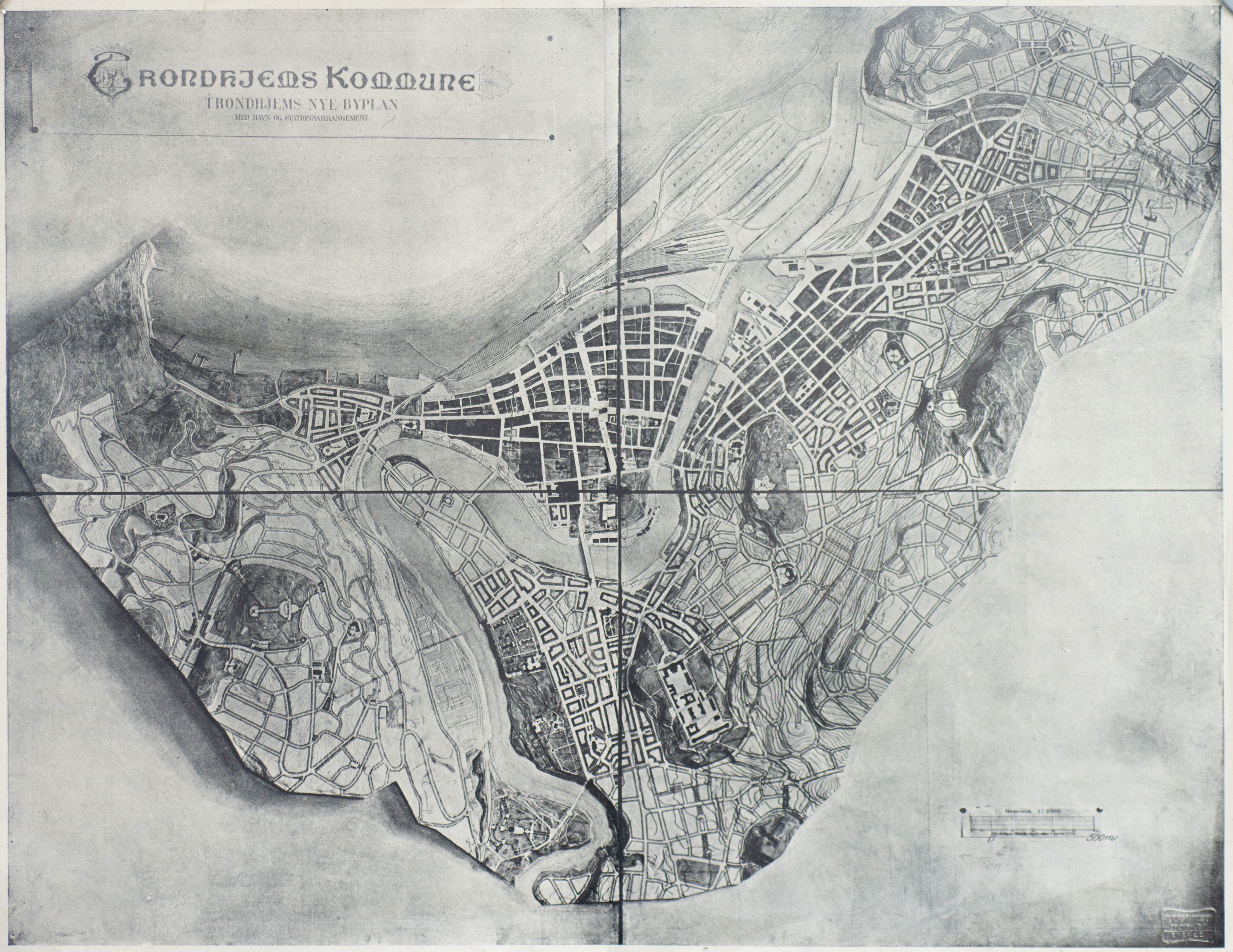 Sverre Pedersens byplan for Trondheim fra 1912.